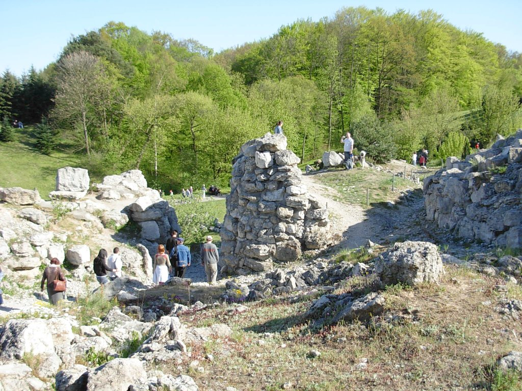 Alpinarium w Ogrodzie Botanicznym w Bydgoszczy-Myślęcinku